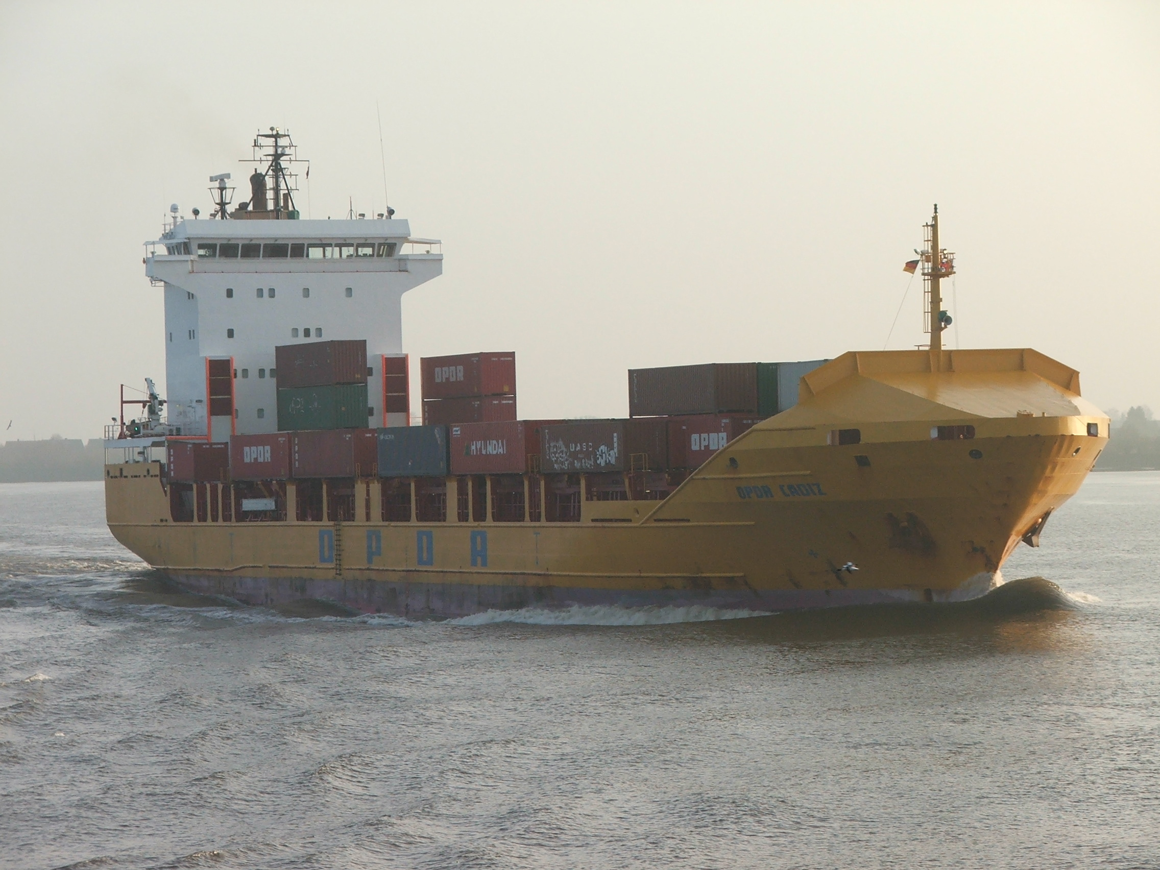 Containerfeederschiff OPDR Cadiz der Hamburger Reederei Oldenburg-Portugiesische Dampfschiffs-Reederei, elbausgehend